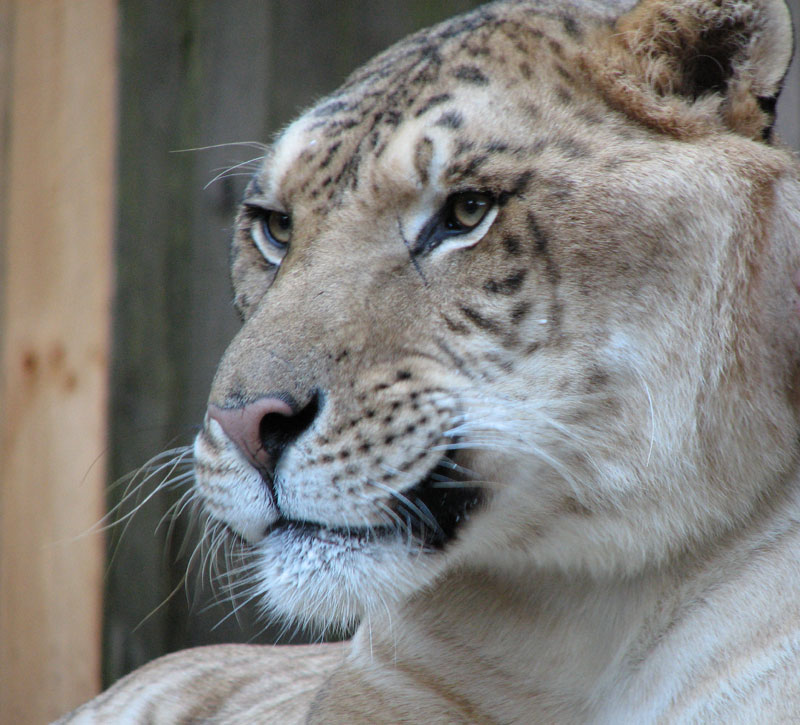 A liger face